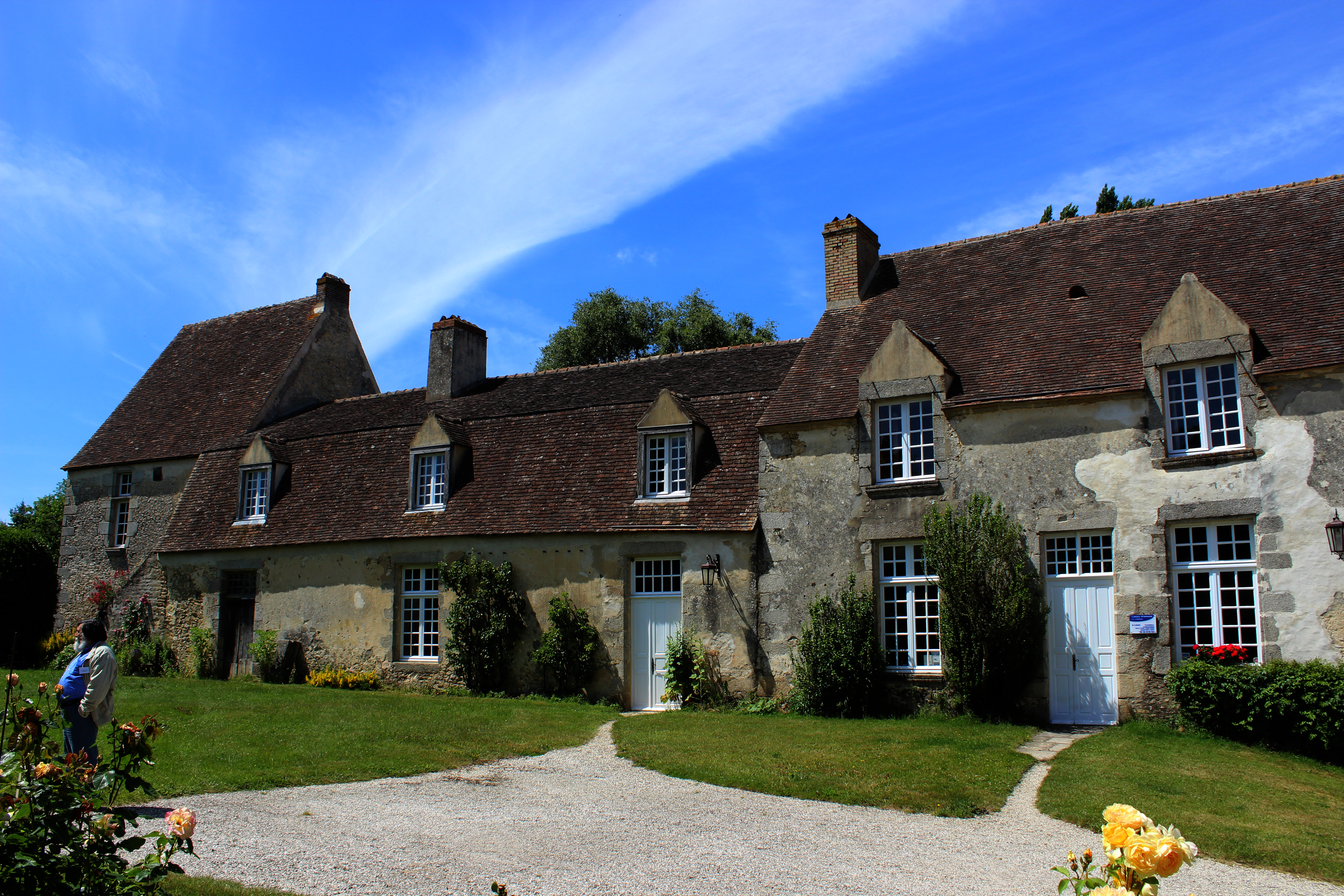 manoir de Bonnefoy à Cerisé (61)